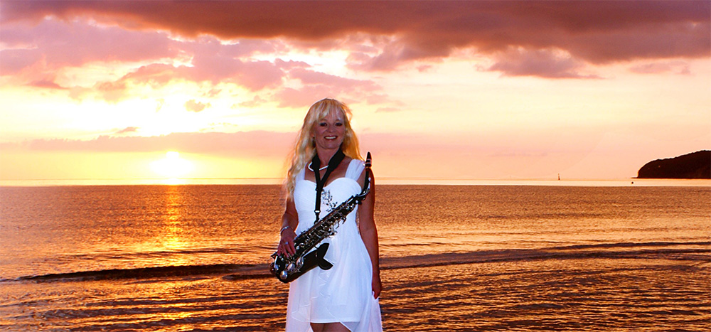 Saxophonistin Kathrin Eipert nach Konzert an der Nordsee.